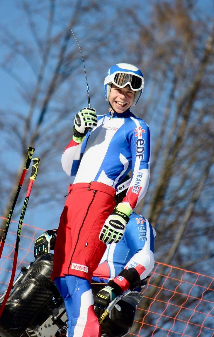 Arthur Bauchet "Jour Off" à Tarvisio 2017